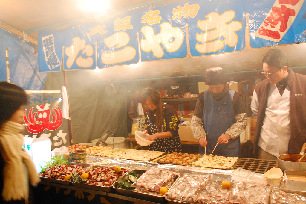 たこ焼き屋台（大阪市住吉区住吉2-9-89、住吉大社）